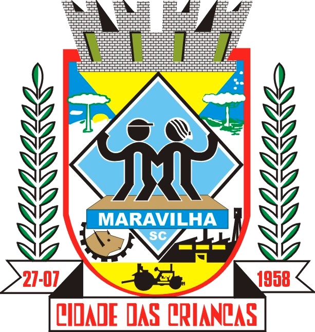 O brasão criado pela Lei n°. 938, de 15 de julho de 1984.